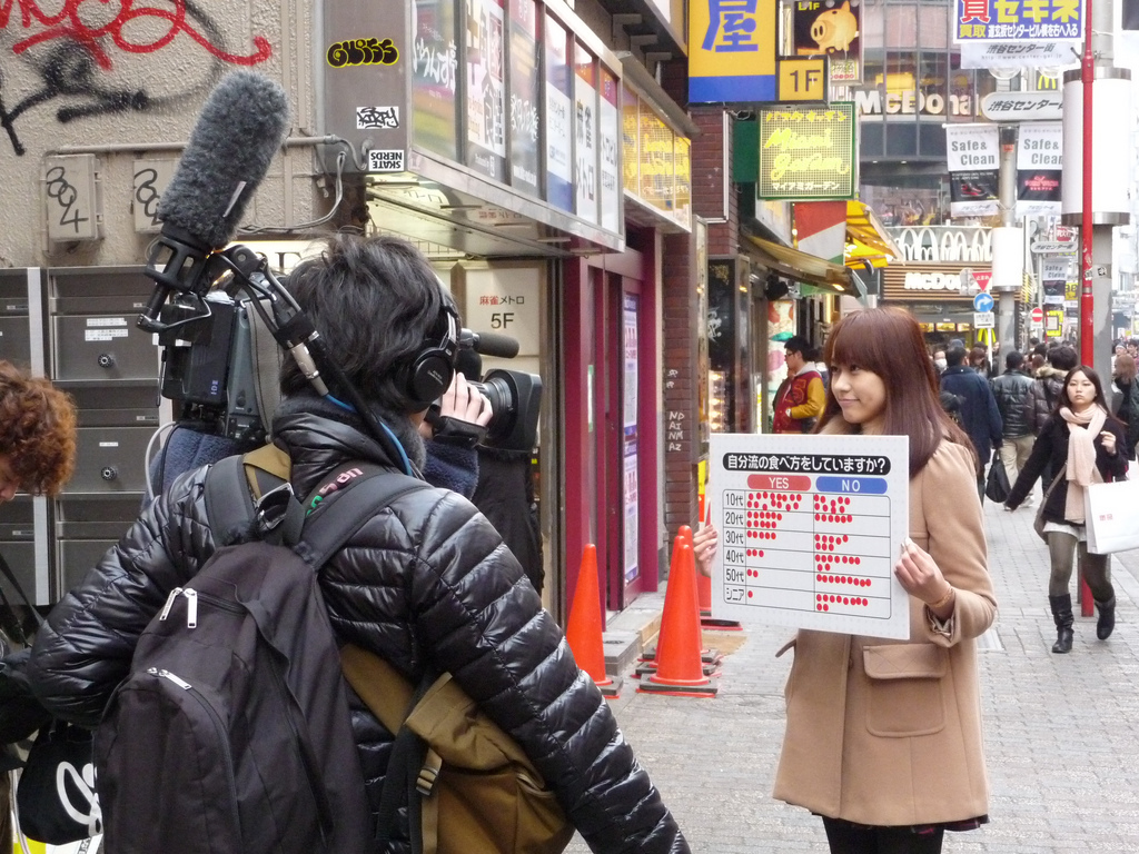 TV フリップボード 自分流の食べ方をしていますか？ 10代 - シニア